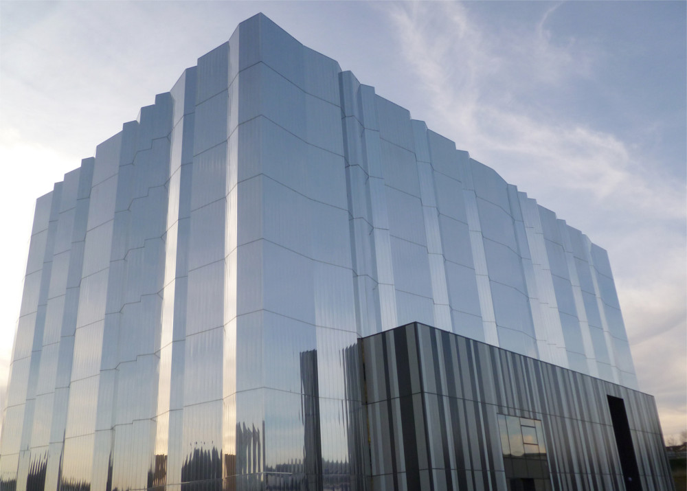 Laboratorio de Ultra Alta Tensión de Arteche, ubicado en Mungia.